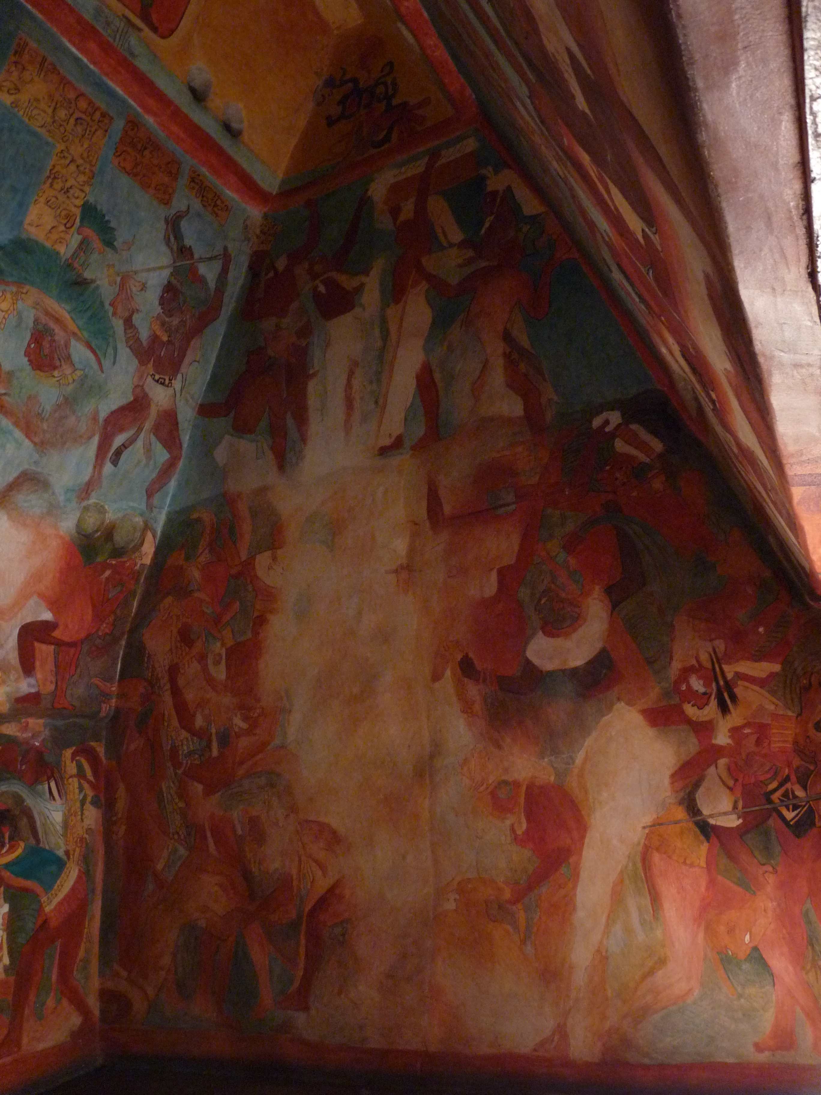 Reproduction de fresques mayas du site archéologique de Bonampak. MNA, Mexico.